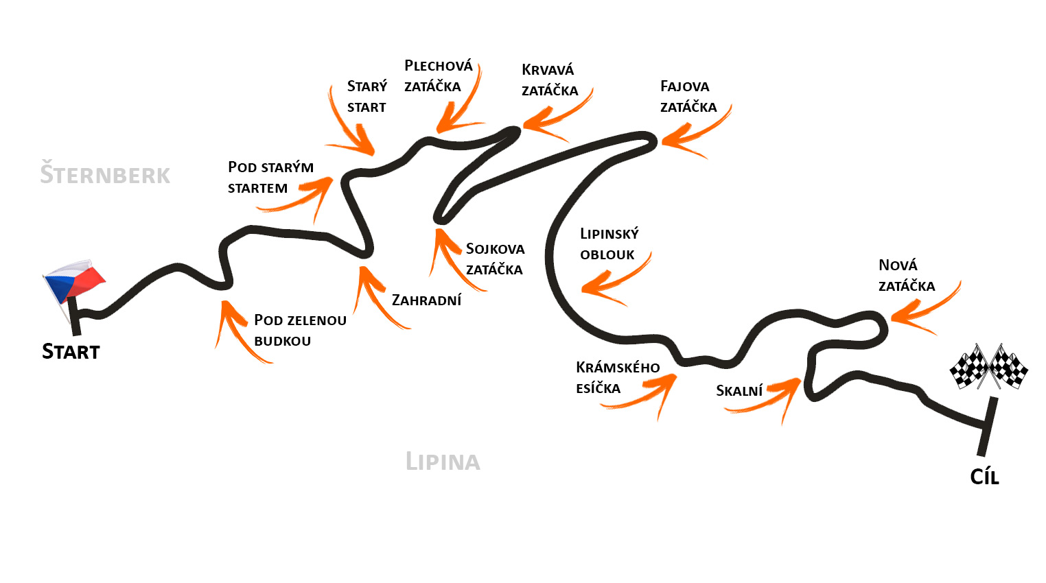 Mapa tratě Ecce Homo s popisem nejznámějších míst